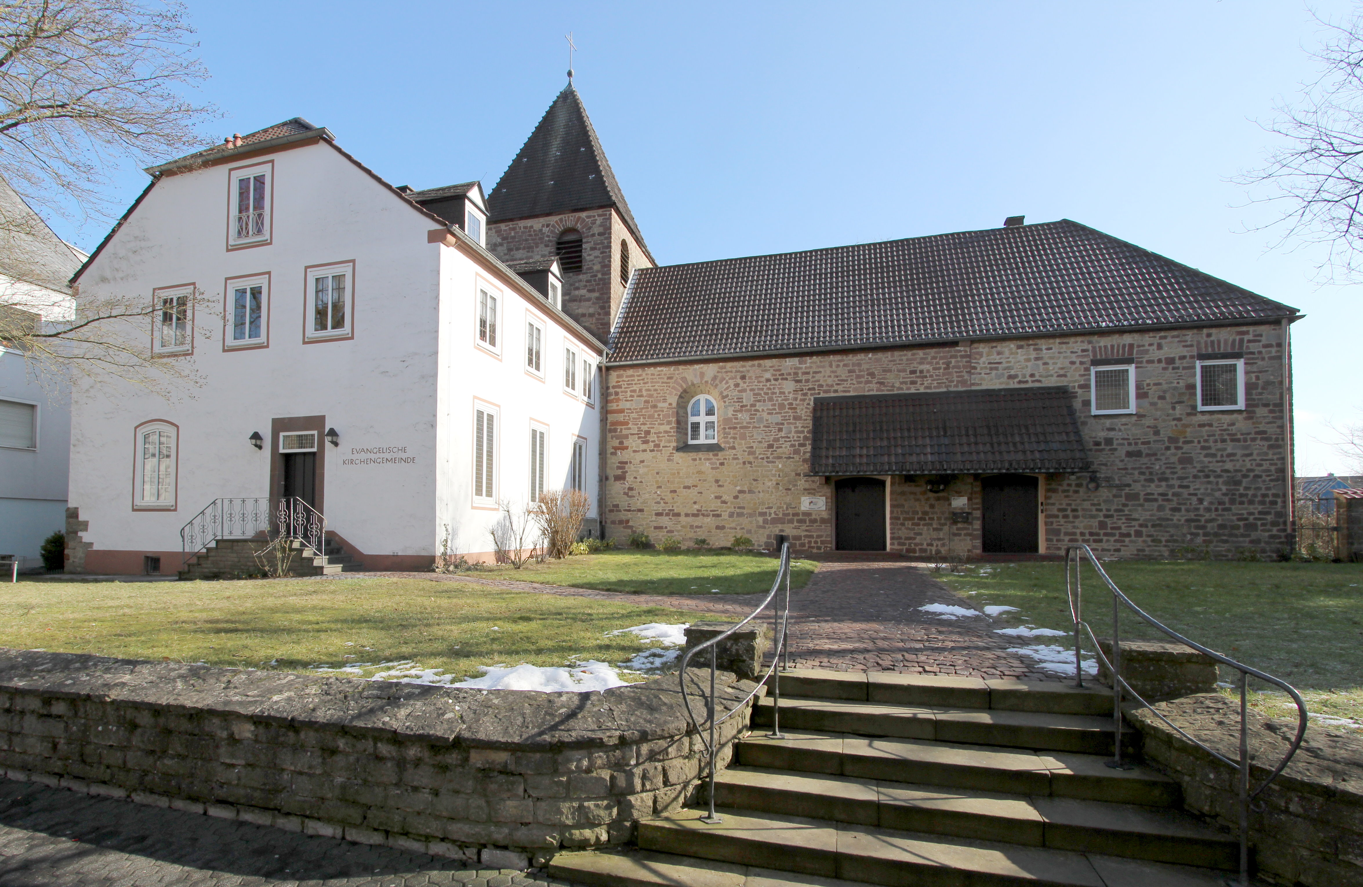 54634 Bitburg, Trierer Straße 17. Rotsandsteinquaderbau, Chorturm mit Zeltdach, das Pfarrhaus ein lotrecht anschließender Putzbau, 1950/52, Architekt Otto Vogel. Aufnahme von 2018.